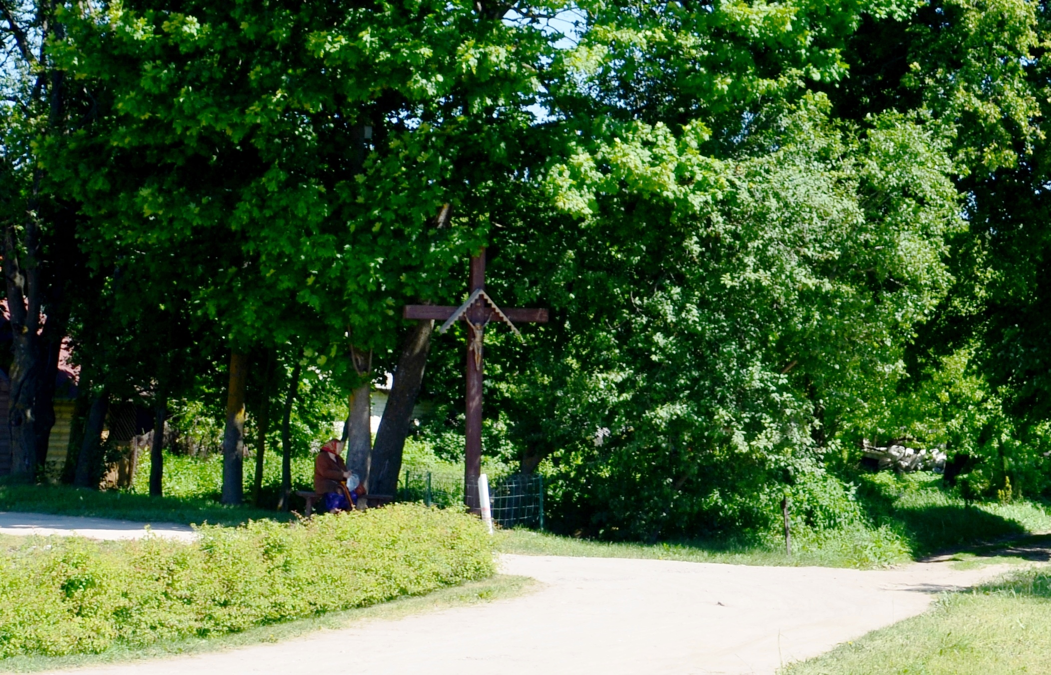 Kryžius Užubaliuose, Vilniaus raj.